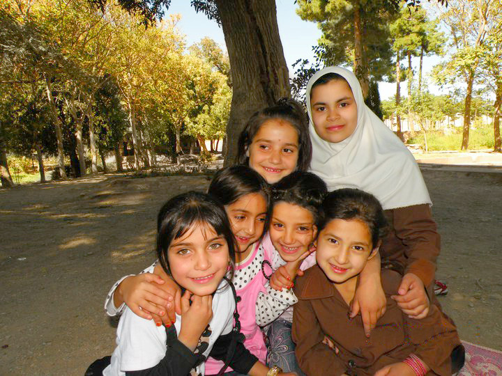 عکسی از دانش آموزان مکتب آینده سازان در سیر تفریحی به شیدایی هرات باستان